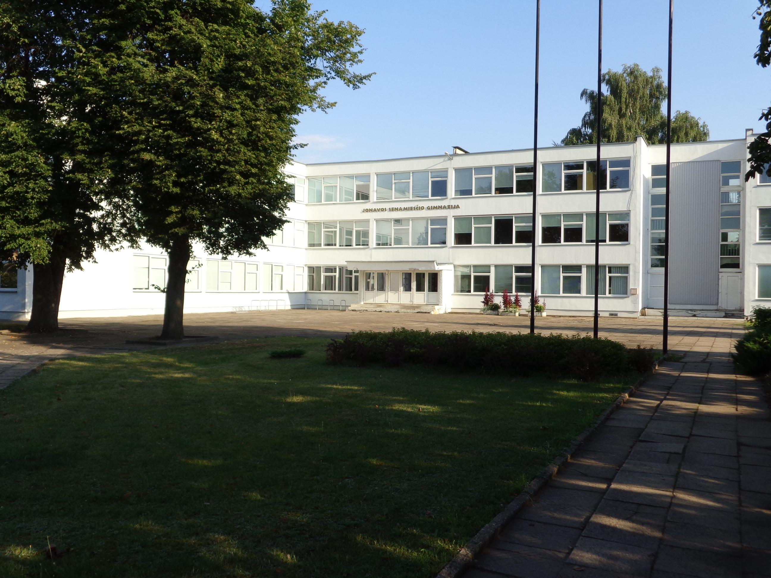 Jonavos Senamiesčio Gimnazija 2014 ryte